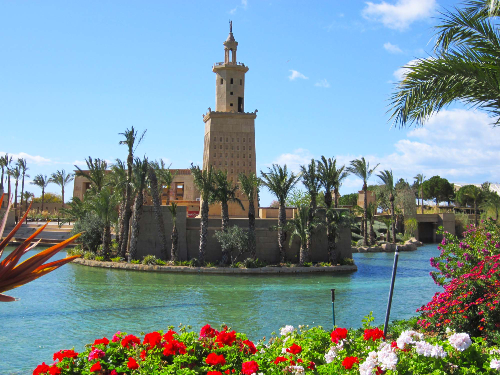 Uno de los símbolos del parque Terra Mítica. Esta ubicado en la zona de Egipto.